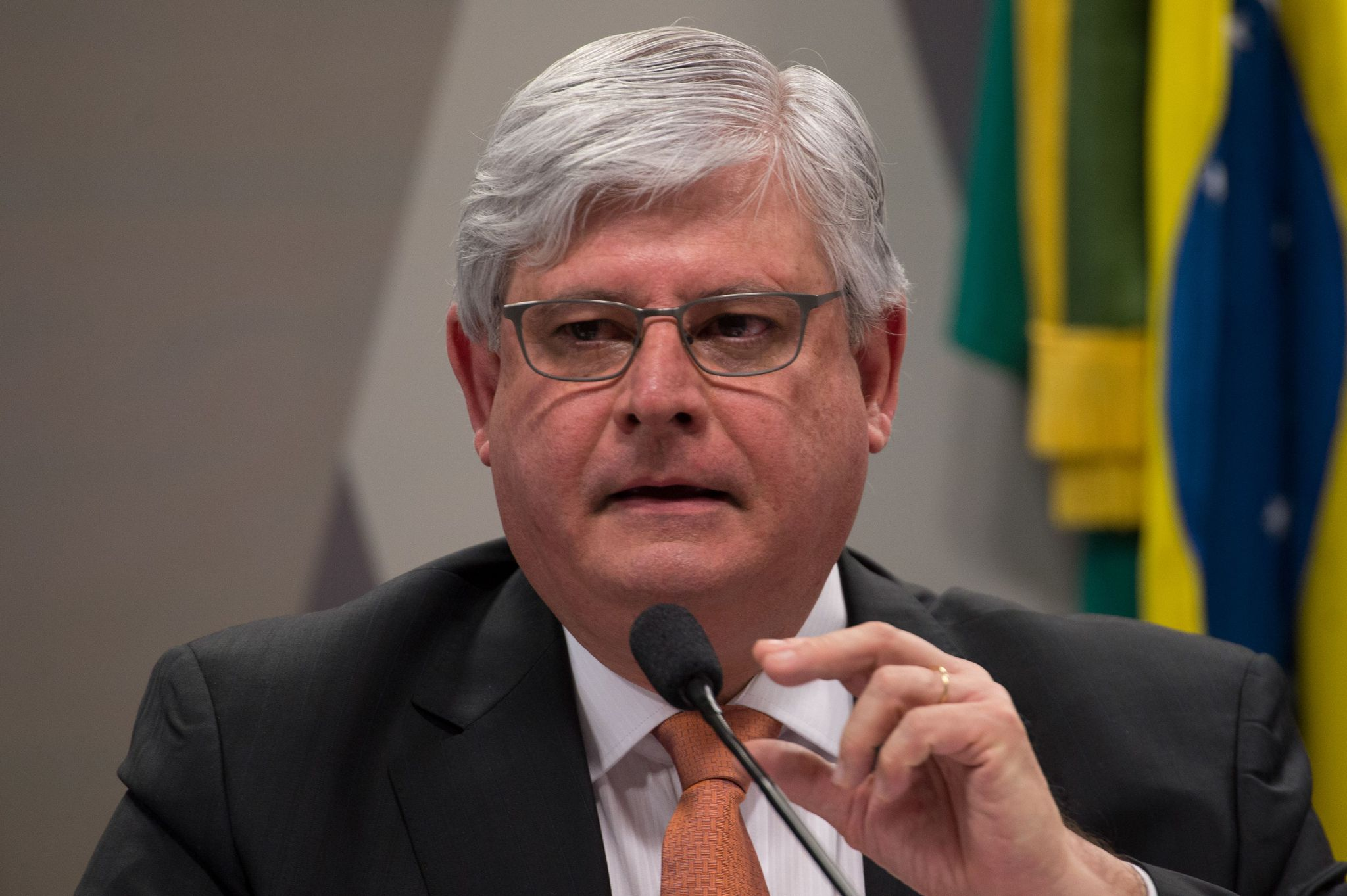 A Comissão de Constituição e Justiça do Senado sabatina Rodrigo Janot Monteiro de Barros, indicado para ser reconduzido ao cargo de procurador-geral da República